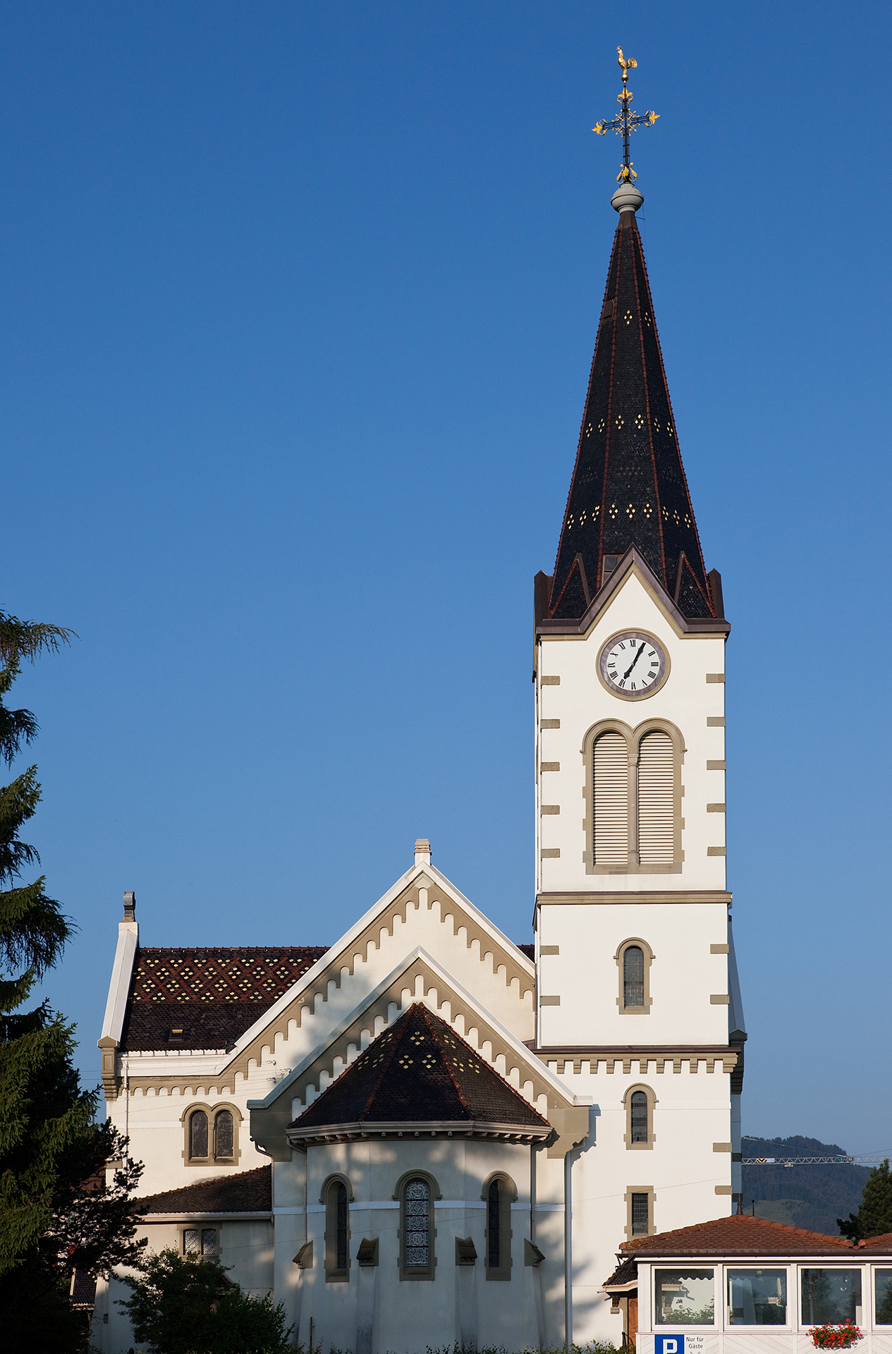 Kirche in Plaffeien (FR)